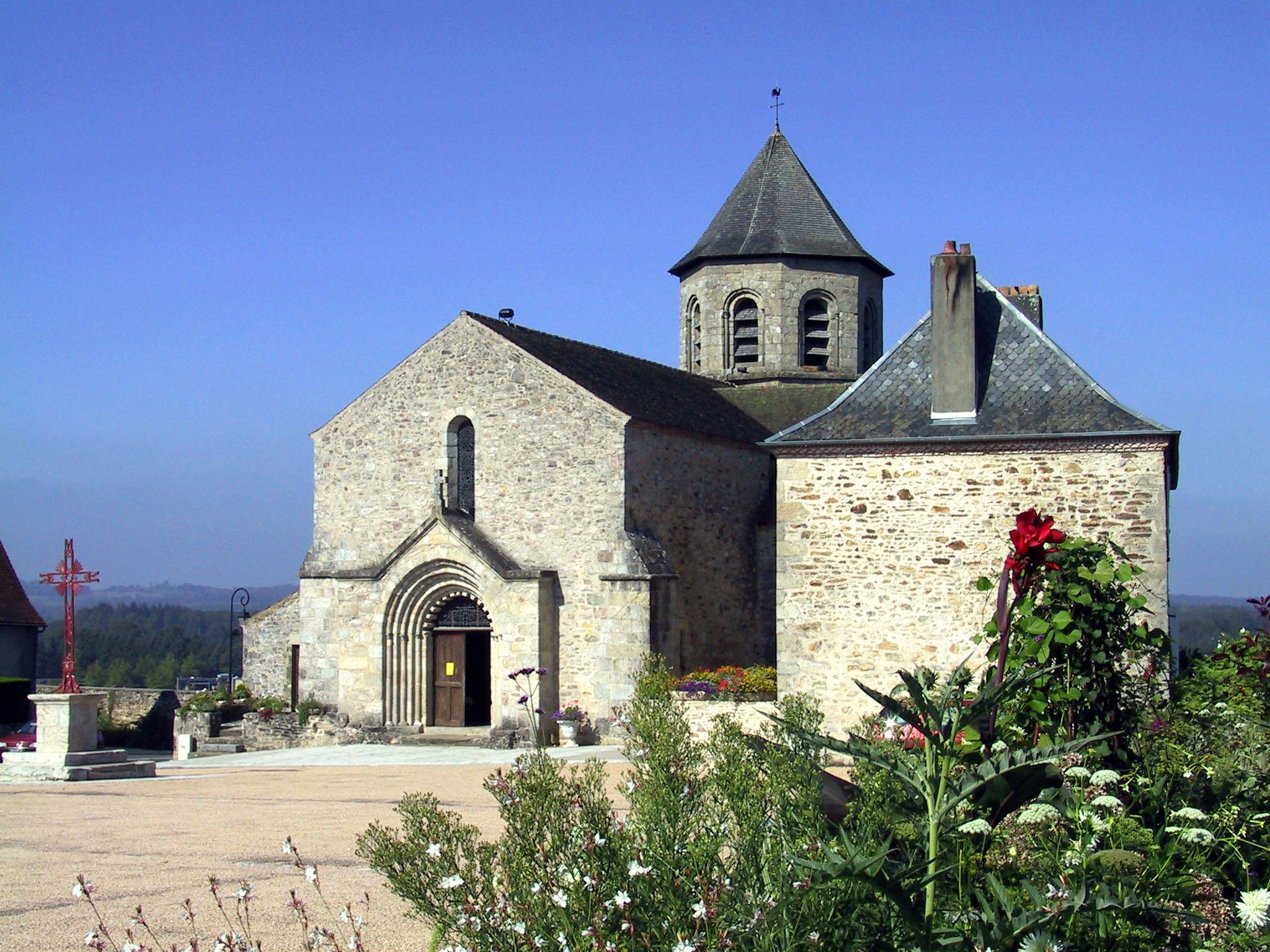 Église Saint-Aignan de Ladignac-le-Long, (Classé, 1910)